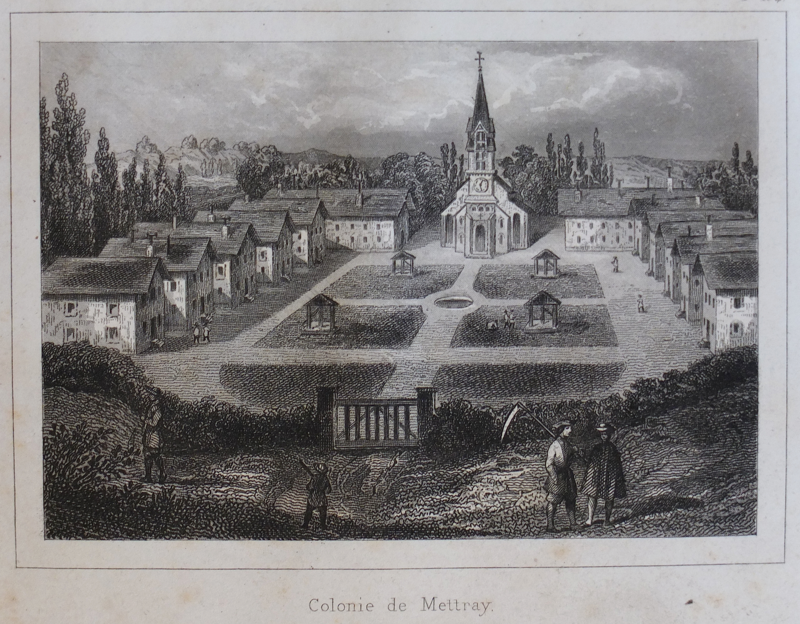 Colonie de Mettray, gravure non créditée dans Un Colon de Mettray, Eugène Nyon, R.Pornin, Tours 1845. Dimension originales gravure : 9,3 x 6,5 cm.